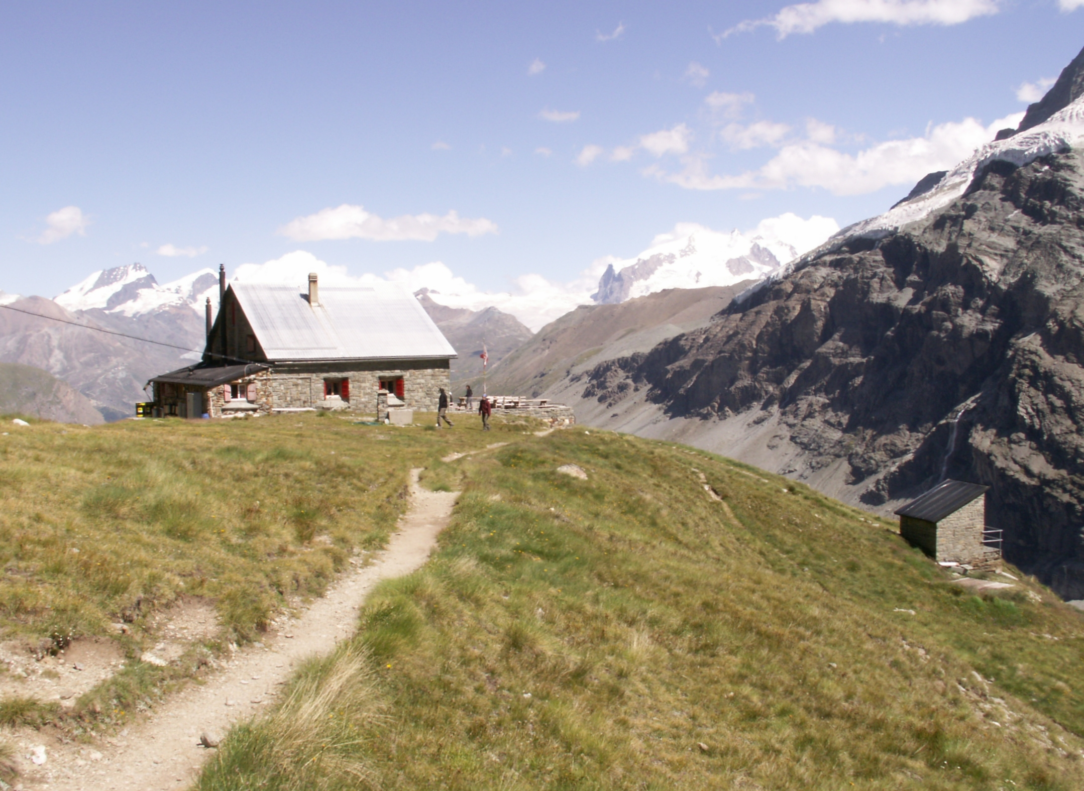 Schönbielhütte bei Zermatt, Sommer